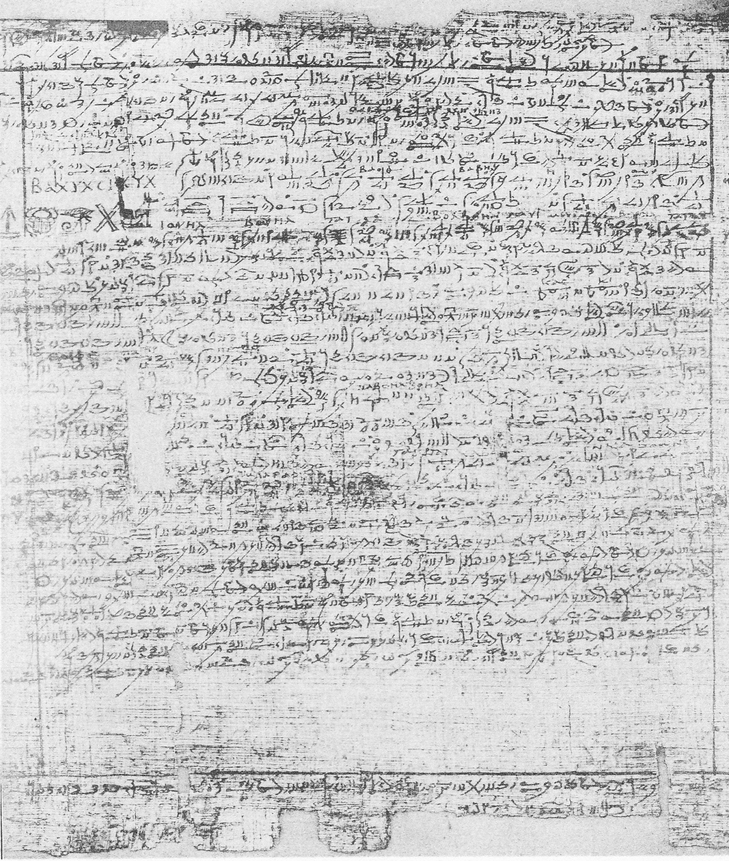 Colonne V du papyrus magique démotique de Londres et de Leyde. IIIe siècle ap. J.-C.